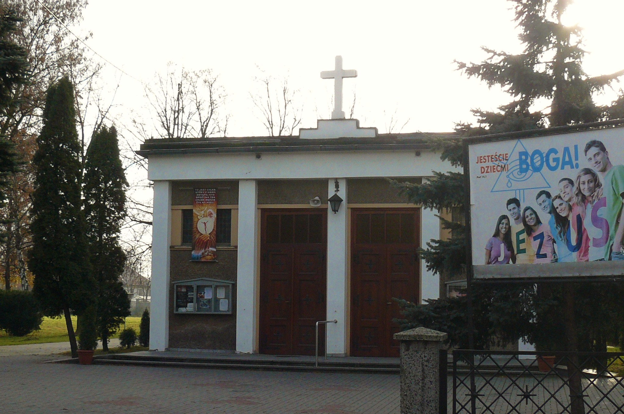 Kościół p.w. Bożego Ciała w Nowych Skalmierzycach.